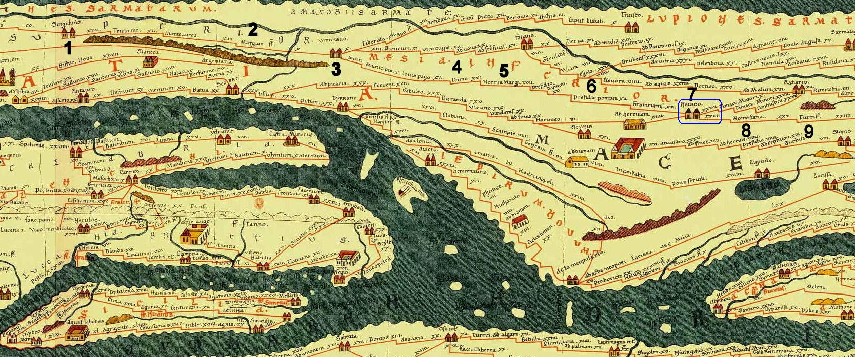 Oivičeno plavom bojom je prikaz položaja Naisa i Medijane u njemu na Pojtingerovoj tabli.